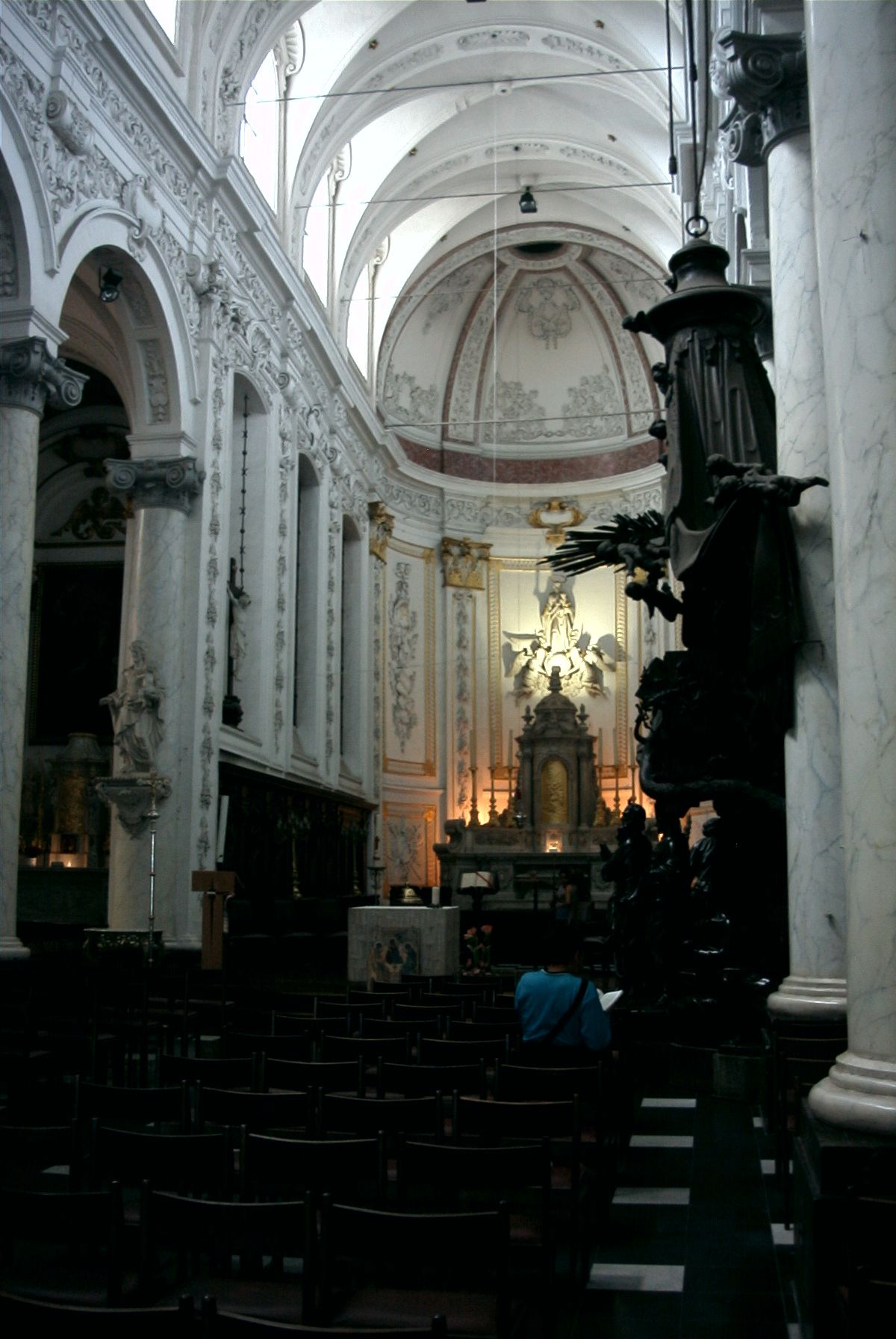 Templombelső Brüsszel városközpontjában